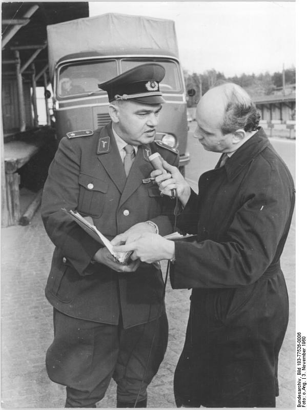 Zentralbild Repro 3.11.1960 Kriegsmaterial beschlagnahmt Von den Kontrollorgangen der Deutschen Demokratischen Republik wurde am Grenzkontrollamt Drewitz die Lastzüge KA-CJ 280 und KA-AC 281, die Waren der Firma Standard Elektronik Lorenz AG, Lorenz-Werke Berlin-Tempelhof nach Westdeutschland transportieren sollten, wegen widersprüchlicher Angaben in den Transportpapieren bzw. wegen Verdachts, daß es sich um Geräte für militärische Zwecke handelt, vorläufig ausgesetzt. UBz: Der Chefinspektor des AZKW Toni Ruh erläutert dem Reporter des Deutschen Fernsehfunks die Dokumente, aus denen einwandfrei hervorgeht, daß es sich hier um Kriegsmaterial handelt.